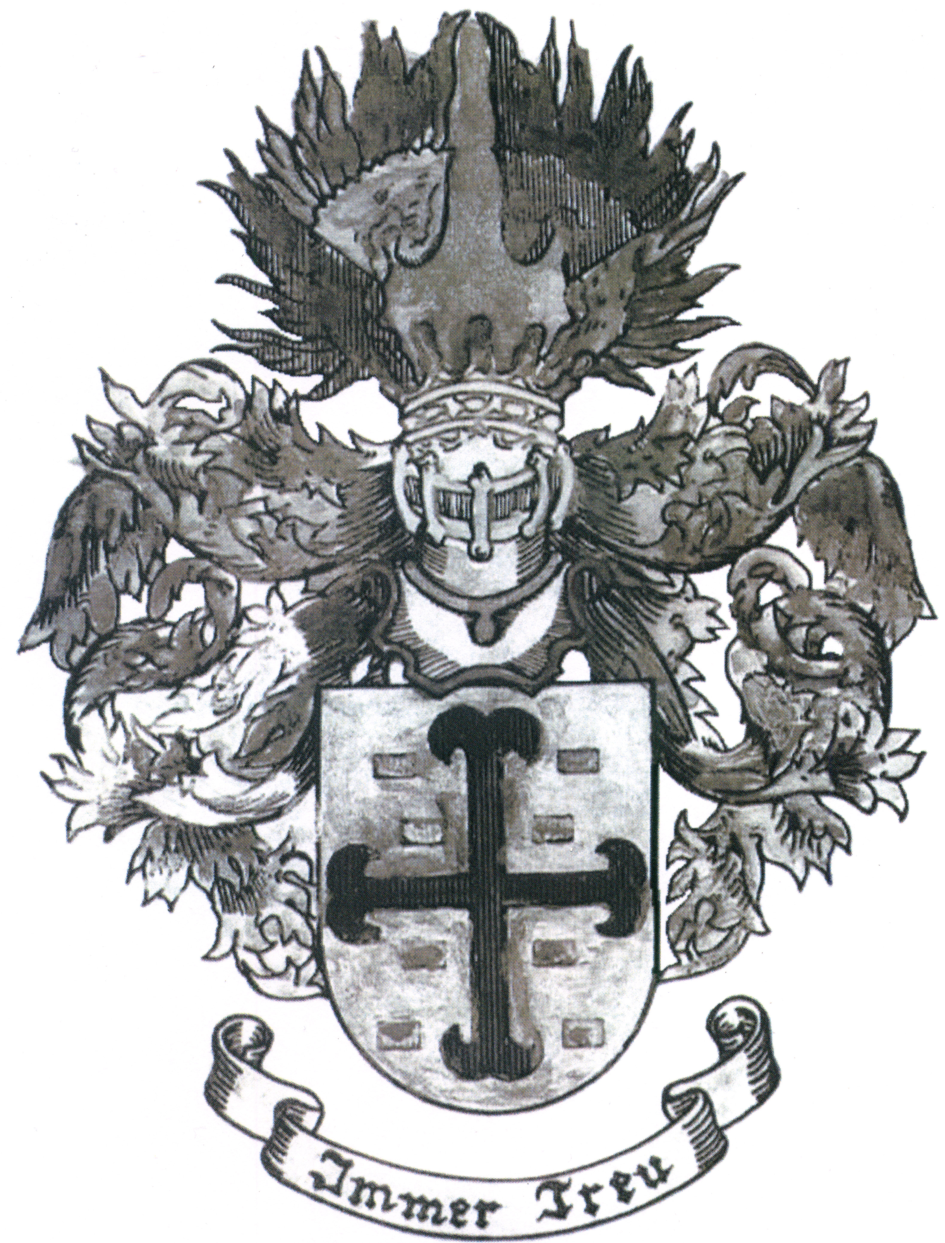 Versão editada em tons de cinza da imagem extraída do documento da árvore genealógica da família, o qual que pode ser obtido no link: Este trabalho de edição foi conduzido pelo descendente Roberto Carlos (Mayrink) Teixeira.